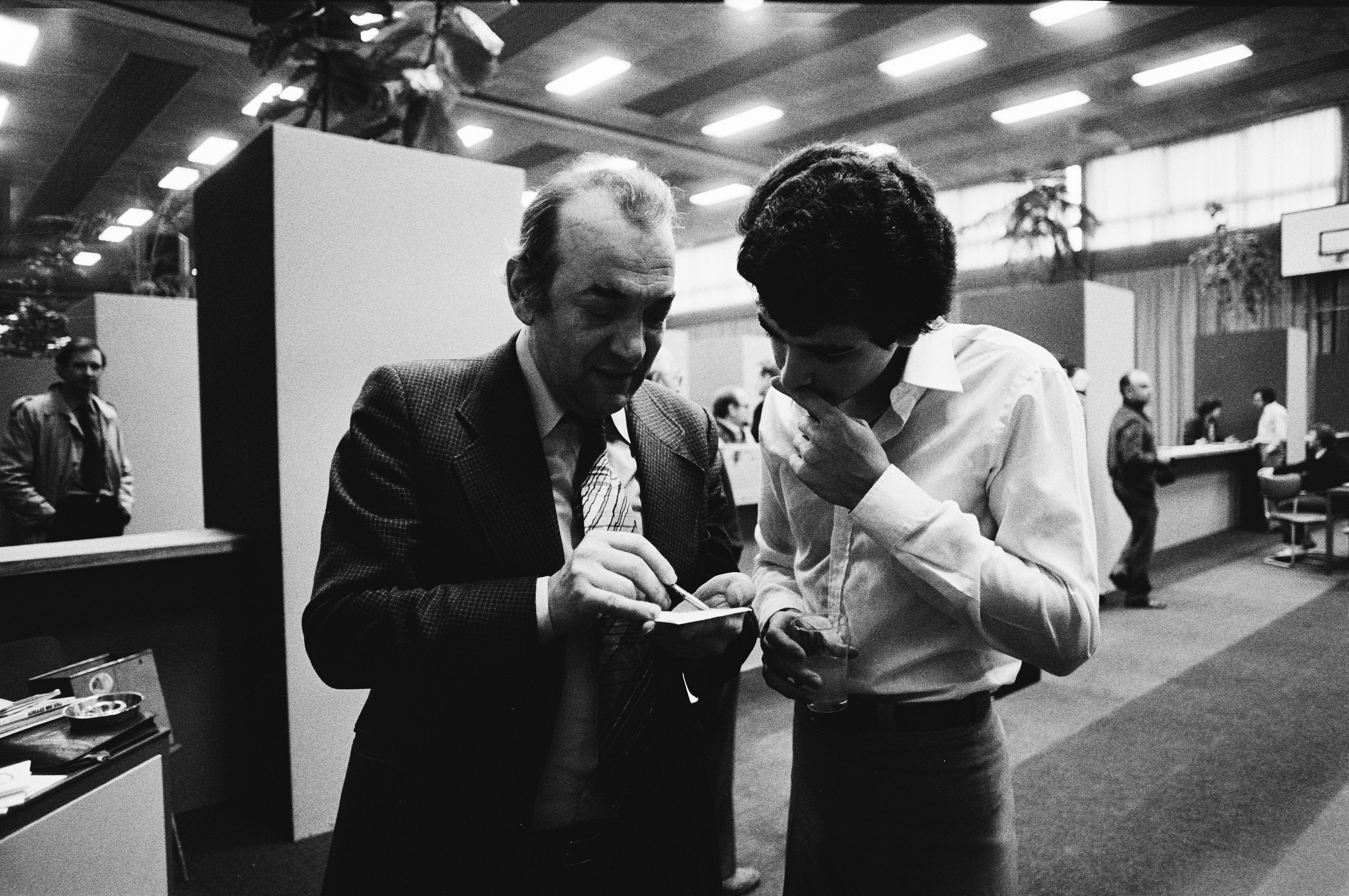 Collectie / Archief : Fotocollectie Anefo Reportage / Serie : [ onbekend ] Beschrijving : Hoogovenschaaktoernooi te Wijk aan Zee ; Seirawan in gesprek met Kortsjnoj (links) Datum : 29 januari 1980 Locatie : Noord-Holland, Wijk aan Zee Trefwoorden : schaken Persoonsnaam : Kortsjnoi, Viktor Instellingsnaam : Hoogovenschaaktoernooi Fotograaf : Croes, Rob C. / Anefo Auteursrechthebbende : Nationaal Archief Materiaalsoort : Negatief (zwart/wit) Nummer archiefinventaris : bekijk toegang 2.24.01.05 Bestanddeelnummer : 930-6457